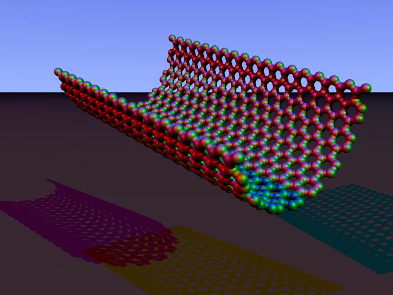 see name